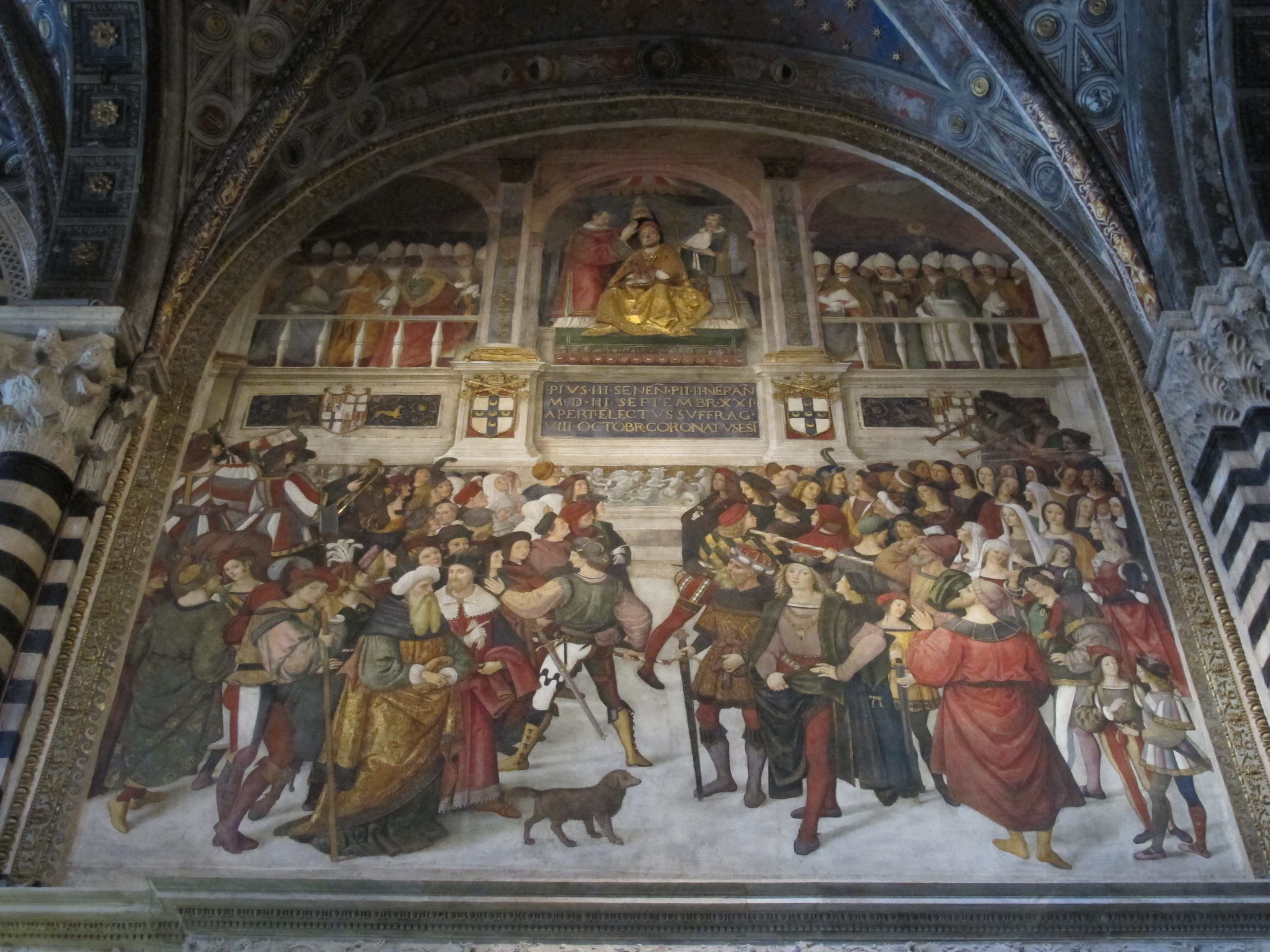 Pinturicchio, Incoronazione di Pio III